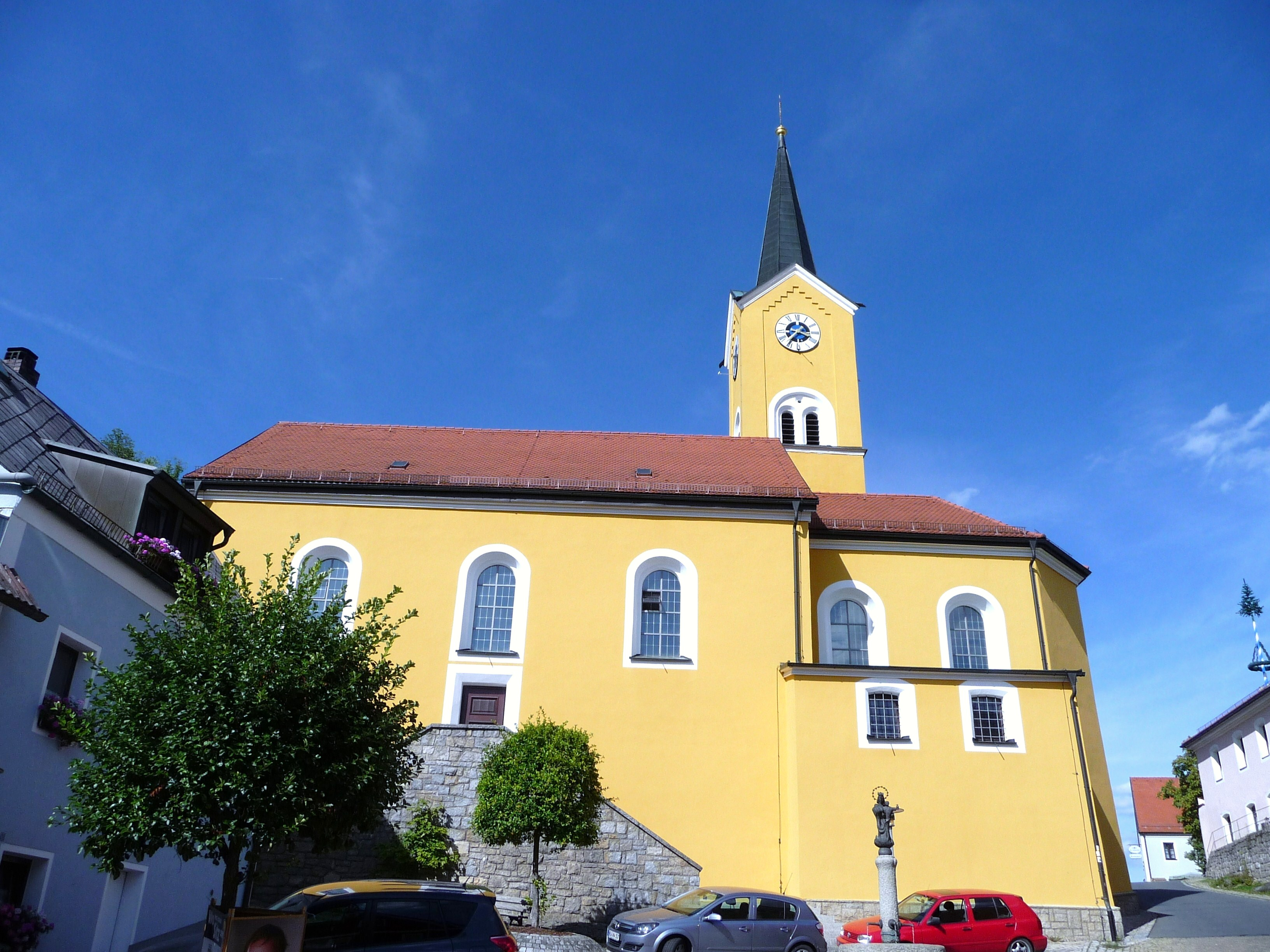 Die Pfarrkirche St. Margareta in Leuchtenberg